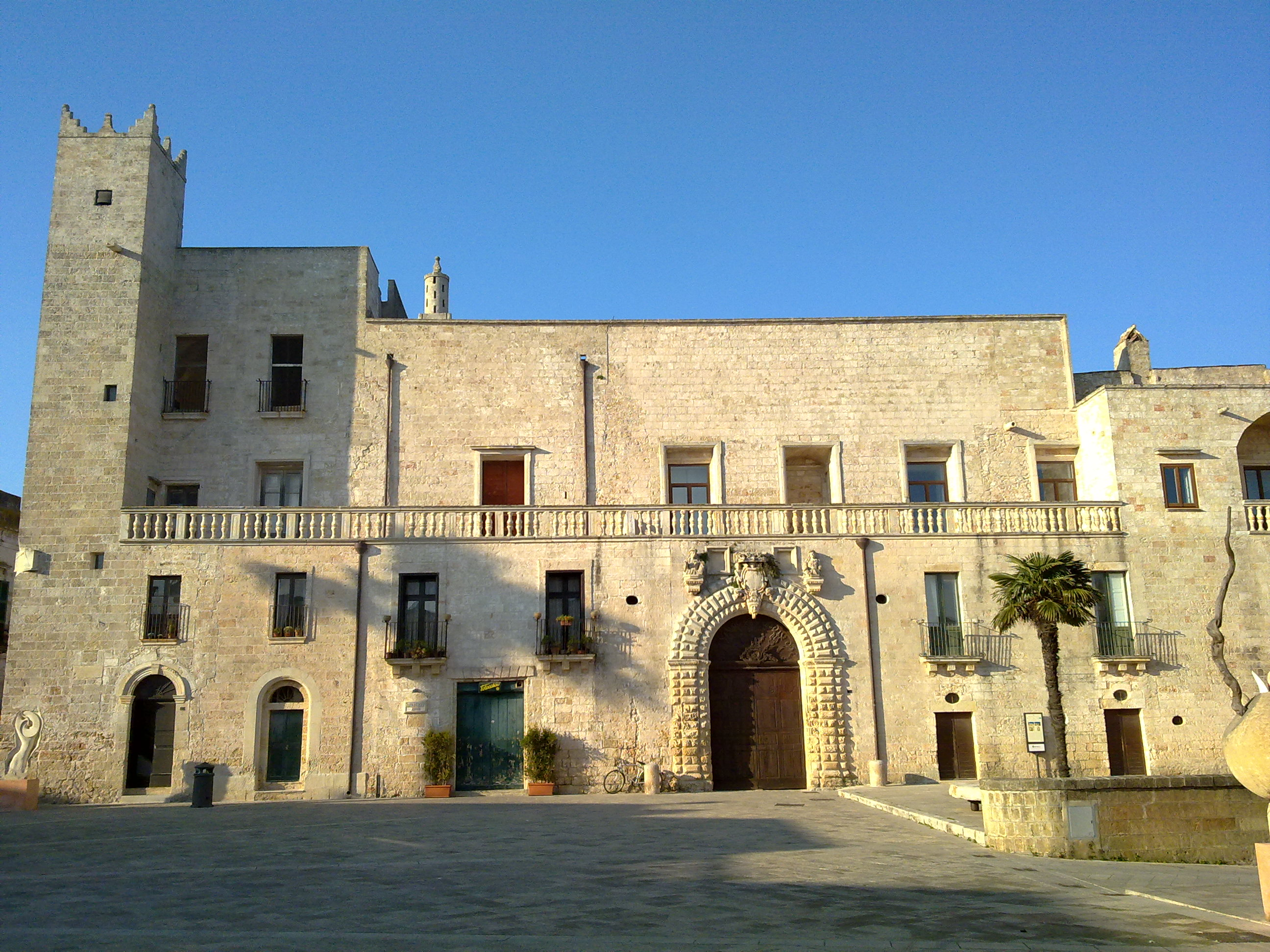 Palazzo Risolo Specchia Lecce